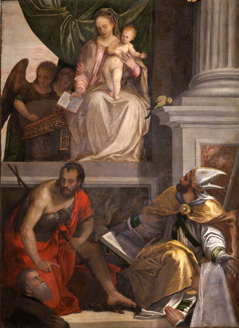 Pala Bevilacqua Lazise - Museo di Castelvecchio - Verona